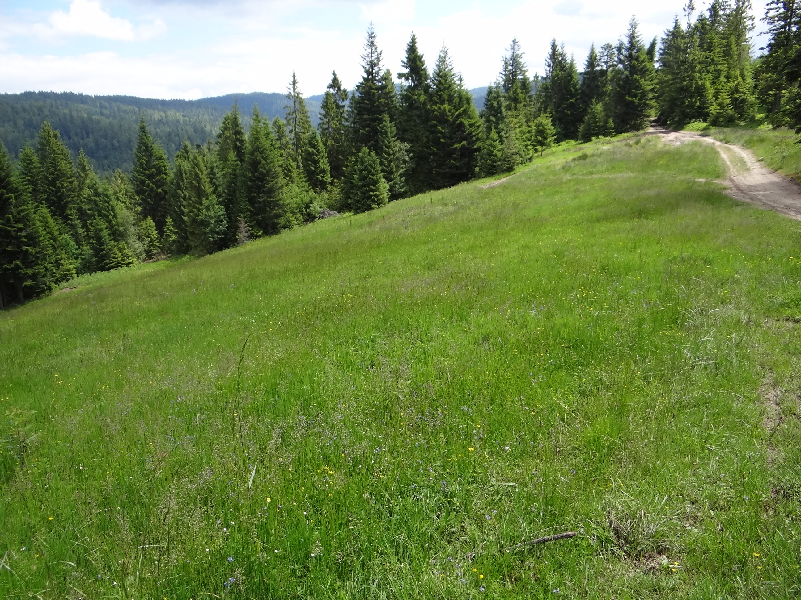 Polana Dermowa w Gorcach